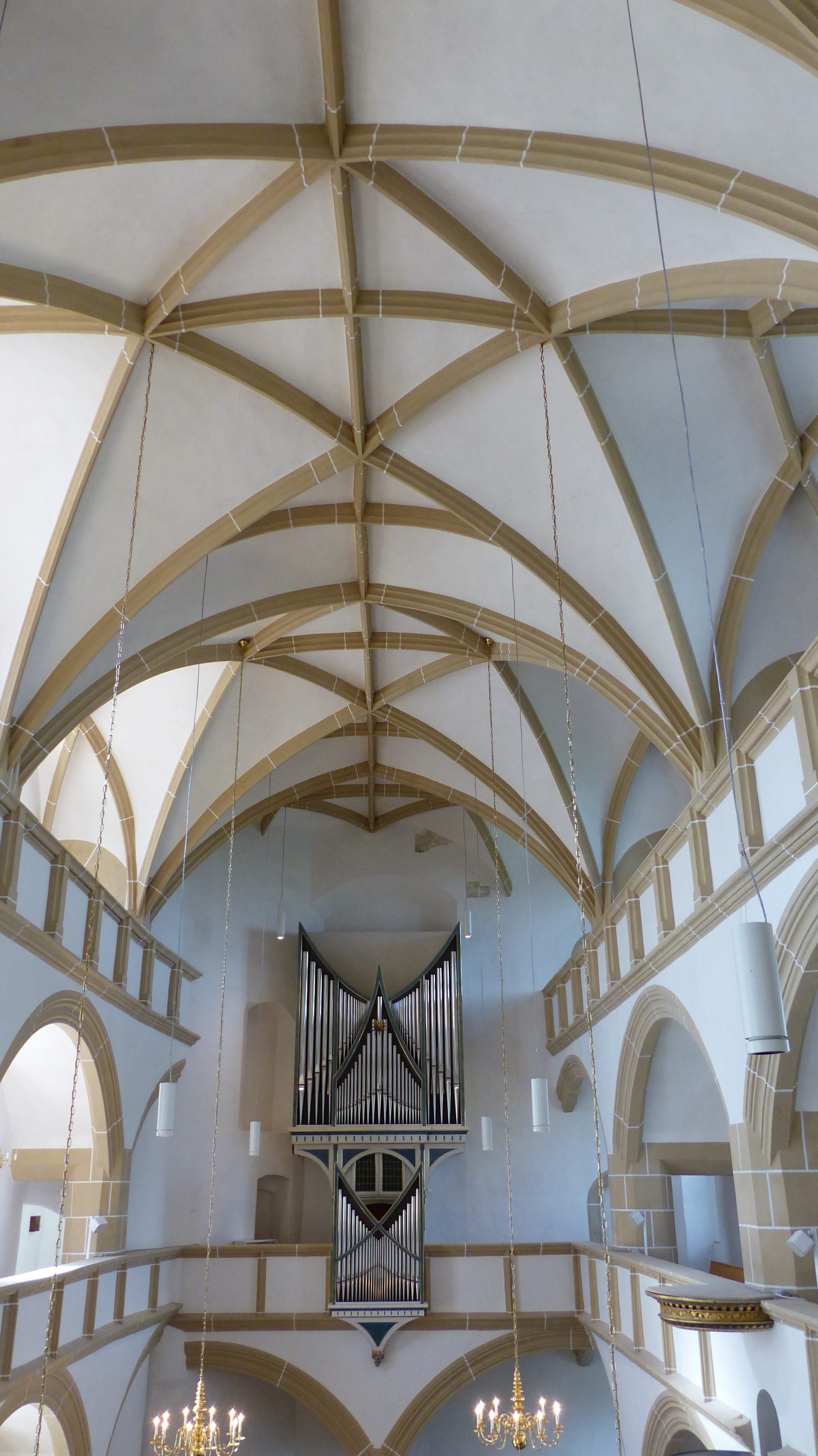 Schloss Hartenfels zu Torgau, Sachsen